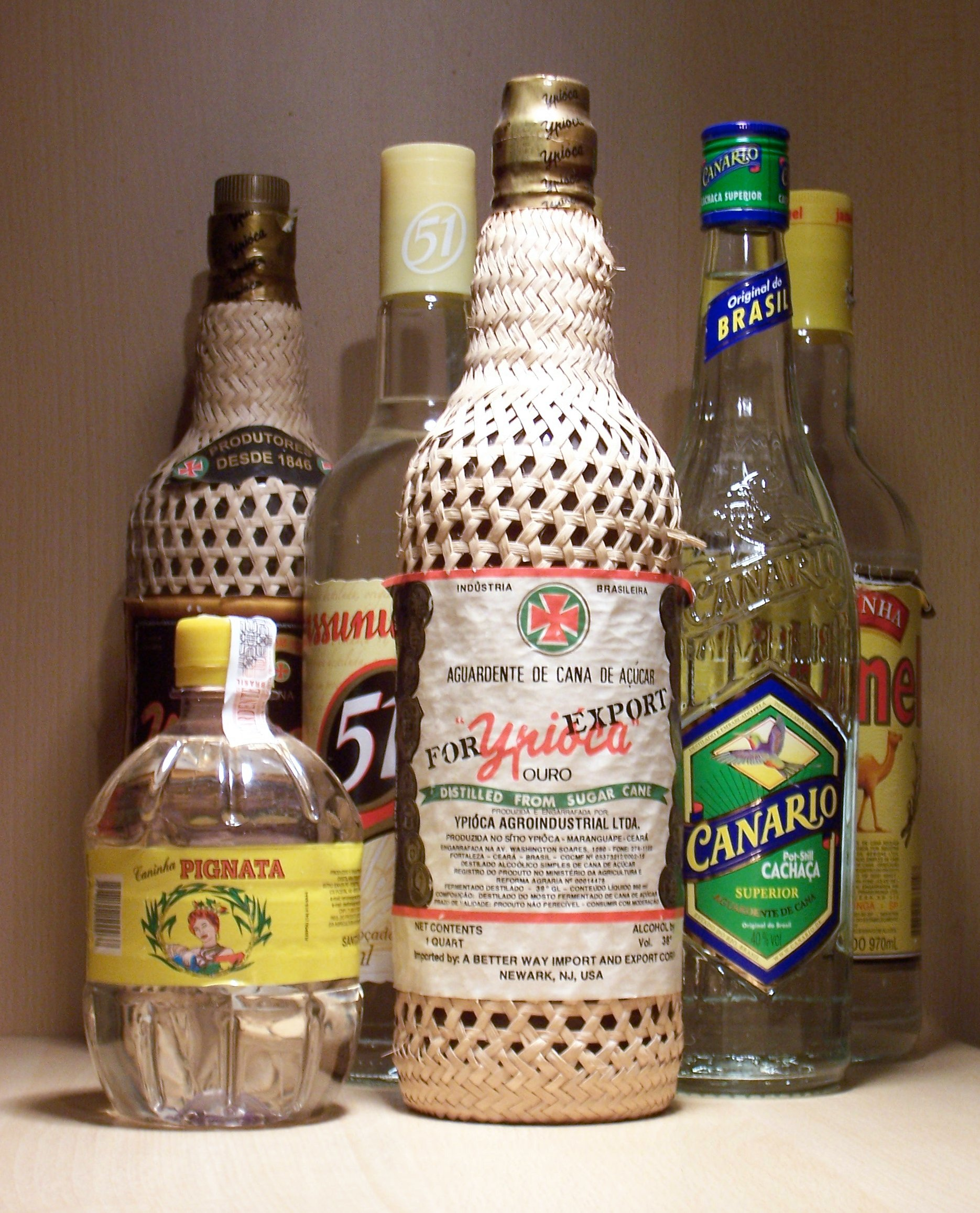 Cachaça. Fotografiert von Tom Tom (Thomas Dohrendorf) im März 2005Lëtzebuergesch: Cachaça-Zorten.